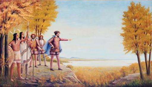 Jacques Cartier sur le mont Royal, huile sur toile, 132,1 x 221,3 x 4,7 cm, collection de la Ville de Montréal, exposée au chalet de la montagne du parc du Mont-Royal